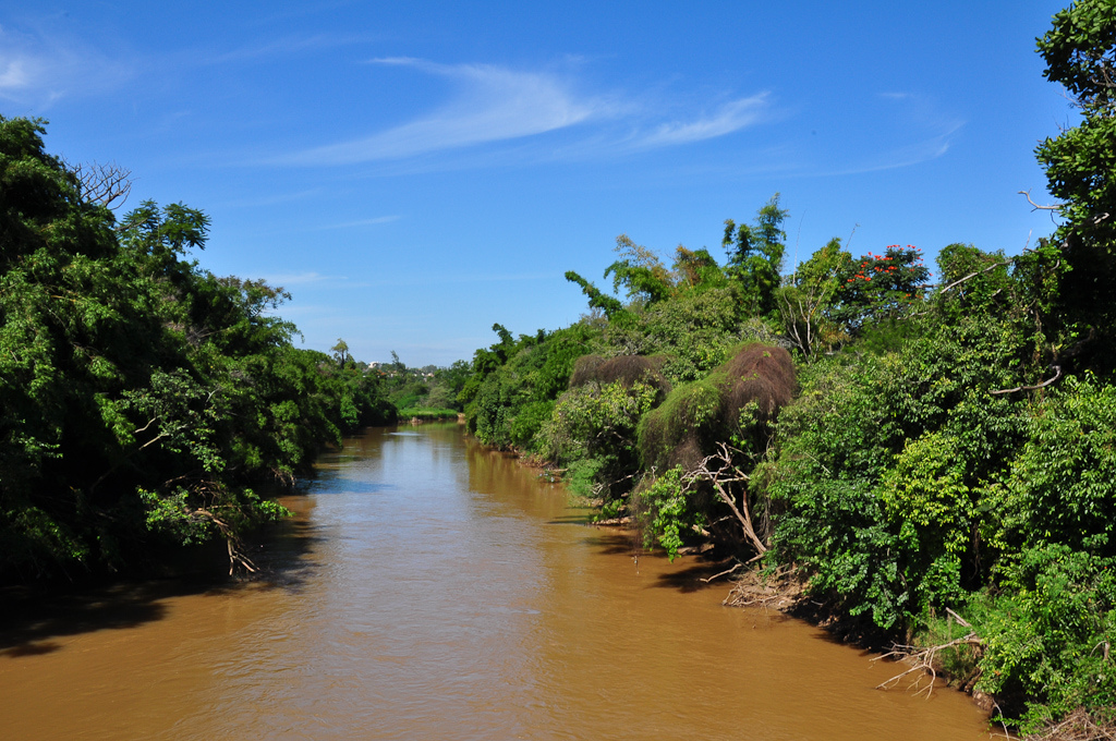 Vista da ponte sobre o Rio Atibaia em Paulínia-SP.